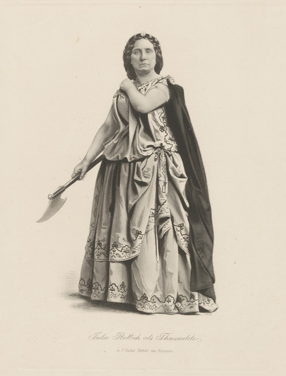 Julie Rettich als Thusnelde in F. Halms Fechter von Ravenna. Lithographie, UB Tübingen